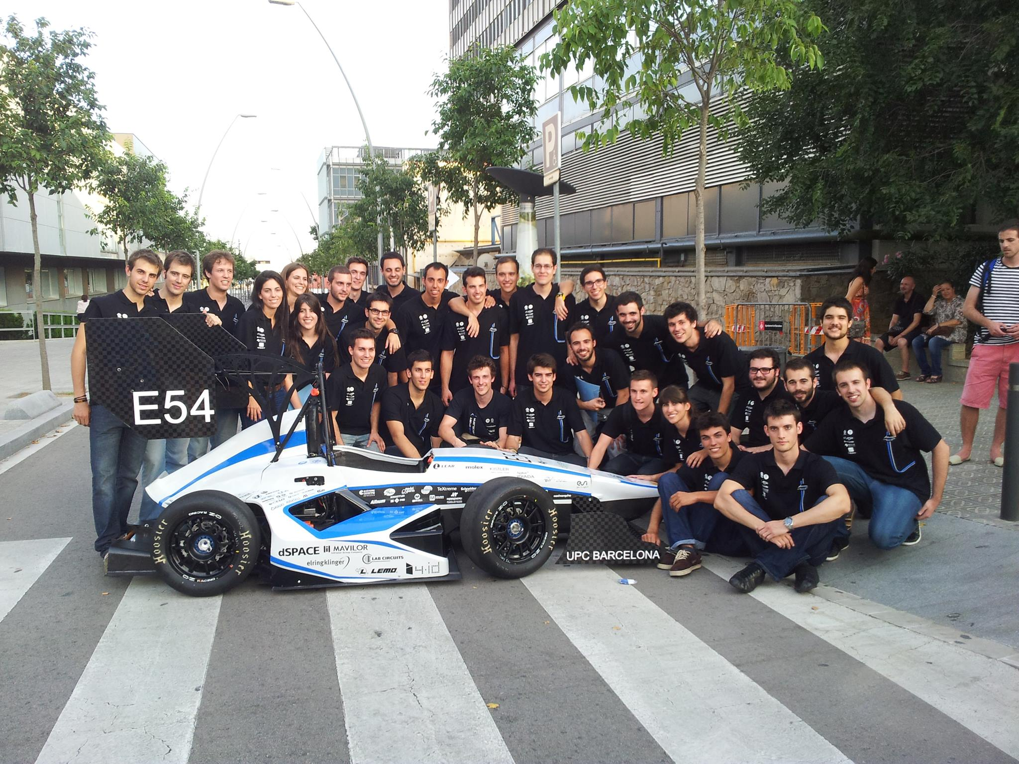 Fotografia de la presentación del coche CAT06e en la universidad ETSEIB motorsport